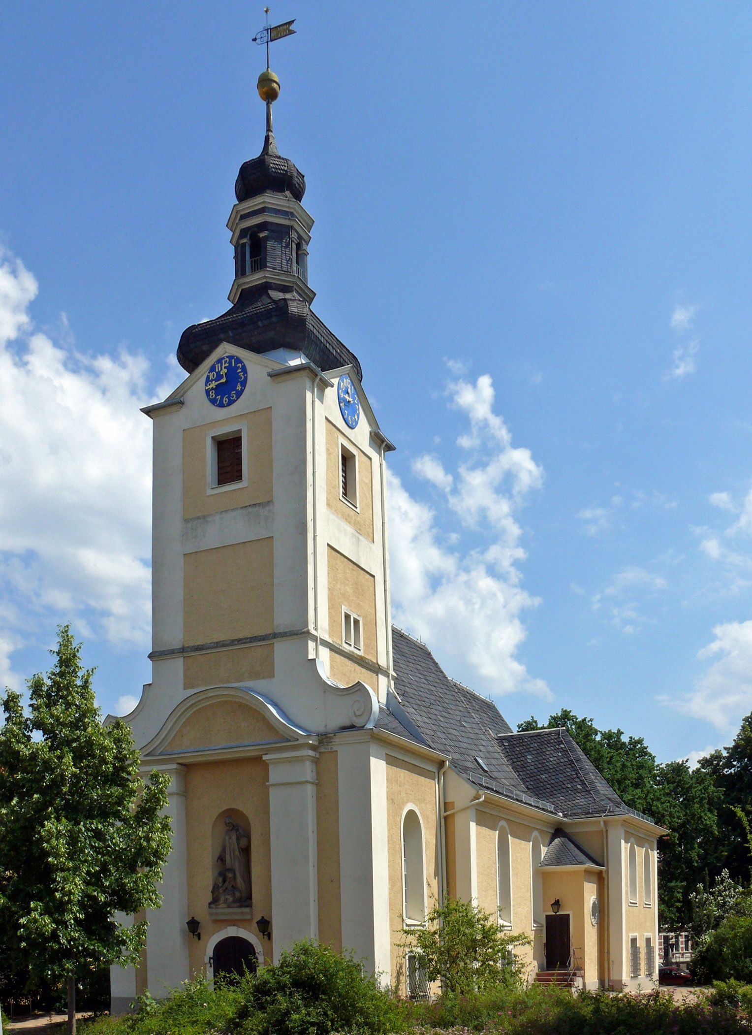 Südwestansicht der Marienkirche in Leipzig-Stötteritz.